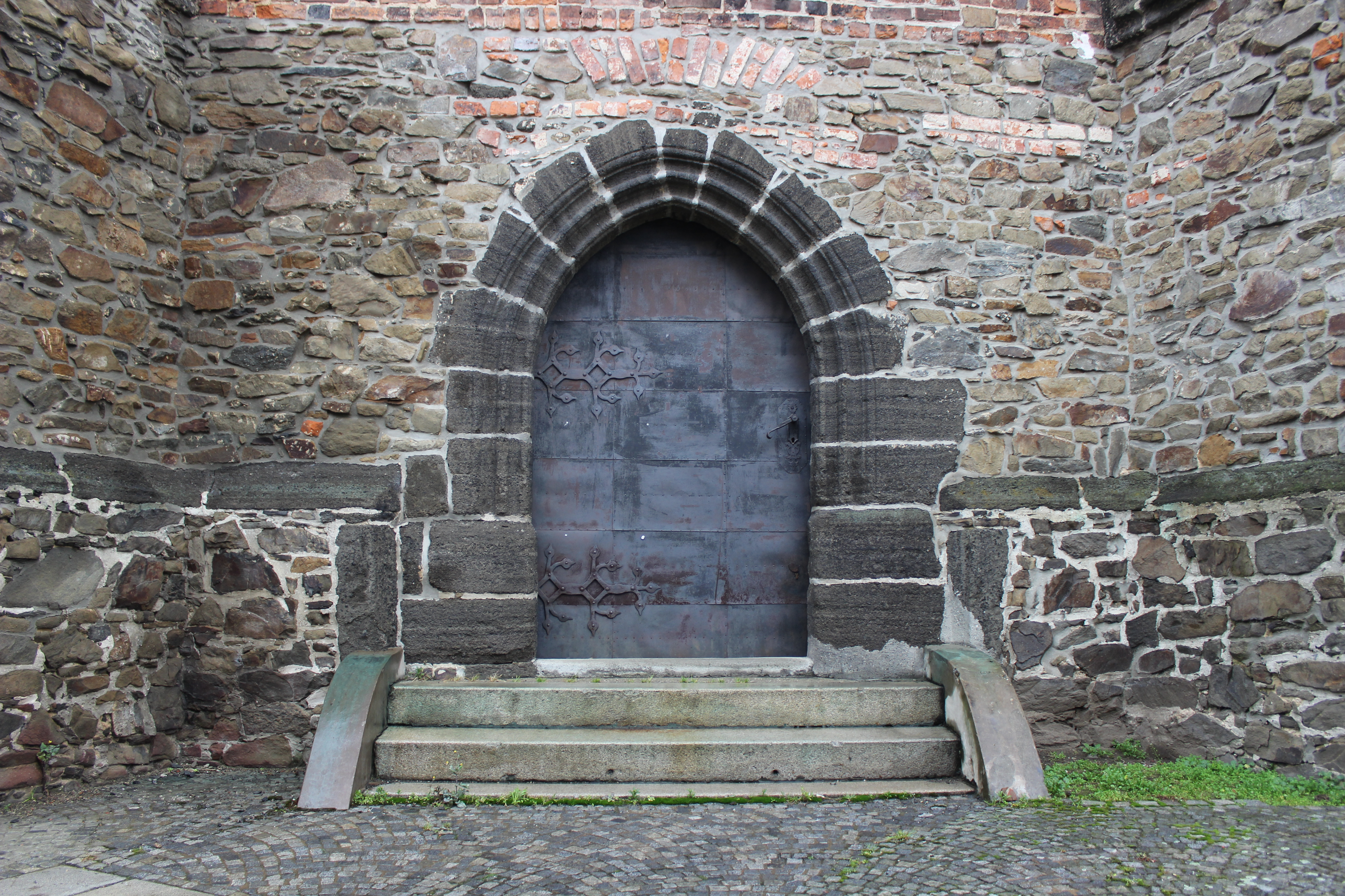 Vstup do opavské kaple svatého Kříže.